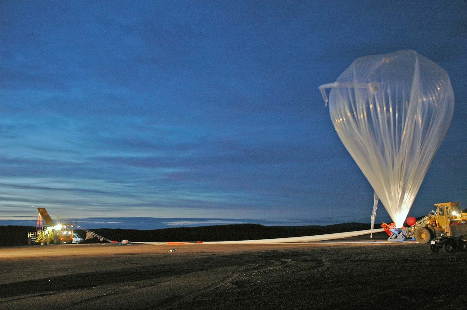 Aufgenommen während der Versuche im Rahmen des EU Projektes Capanina August 2005. Start des Stratosphärenballons mit der optischen Nutzlast.